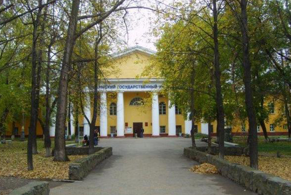 Пермский государственный университет, 5 корпус